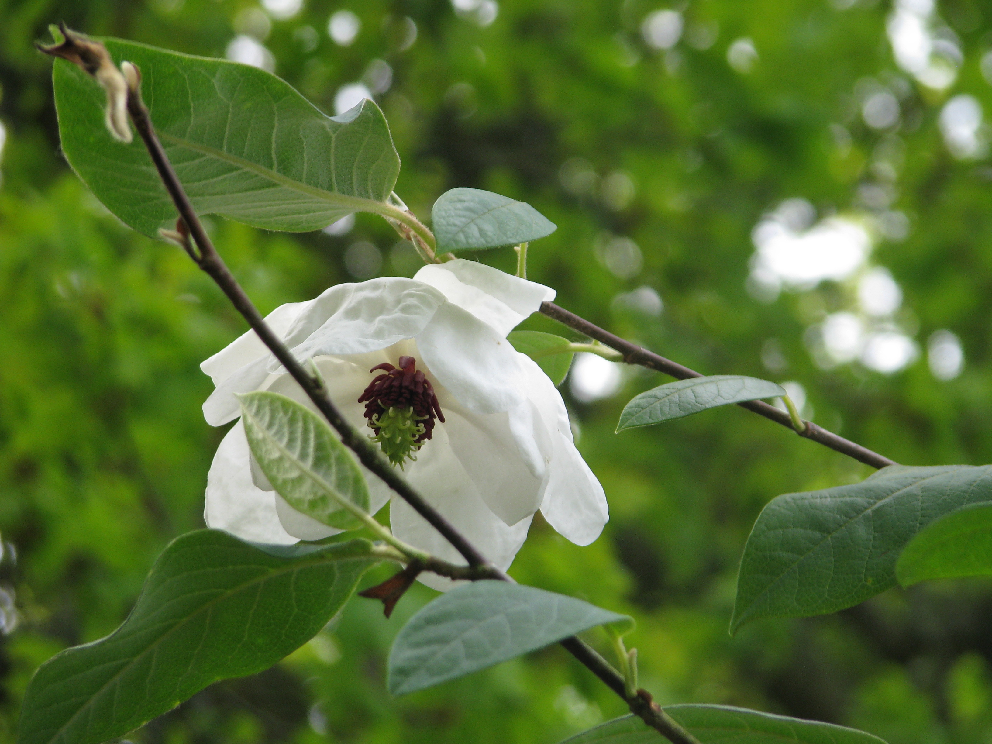 Magnolia wilsonii